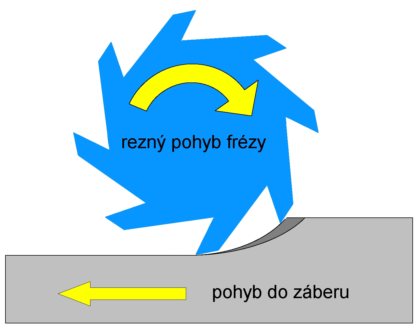 Gleichlauffräsen